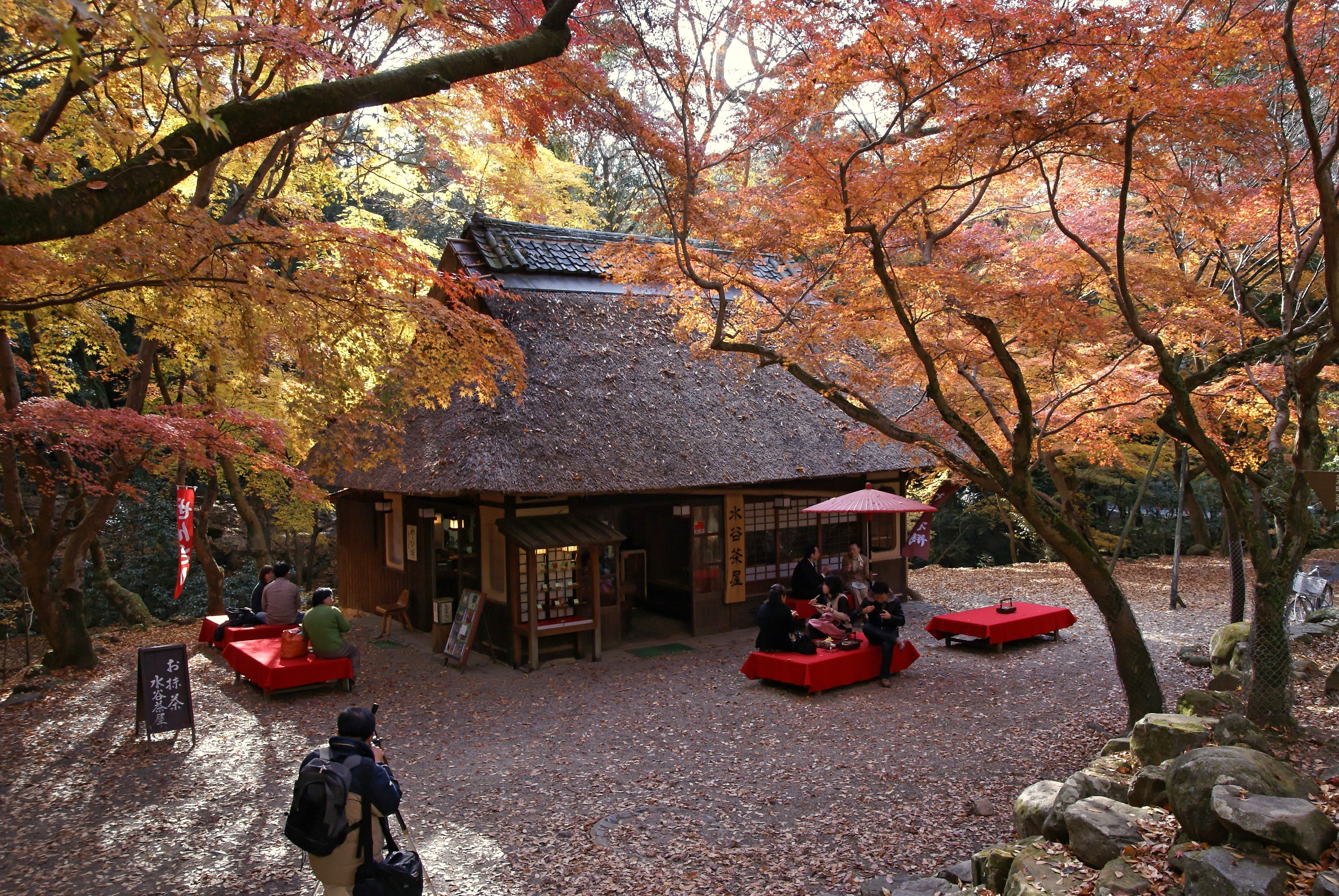 Mizutani-tyaya in Nara, Nara prefecture, Japan